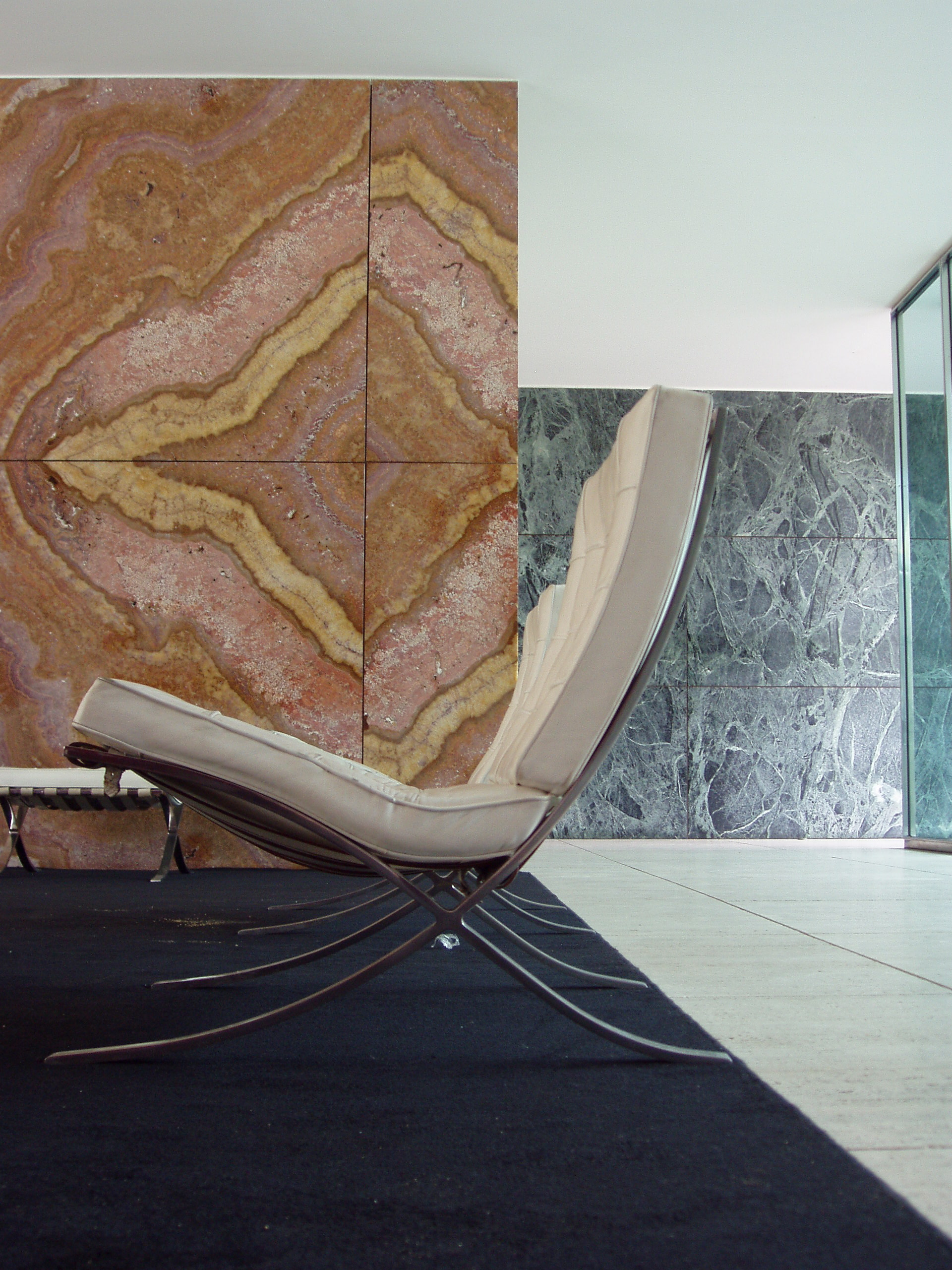 Pabellón de Alemania en la Exposición Universal de Barcelona 1929 (reconstruido). Arquitecto Ludwig Mies van der Rohe.